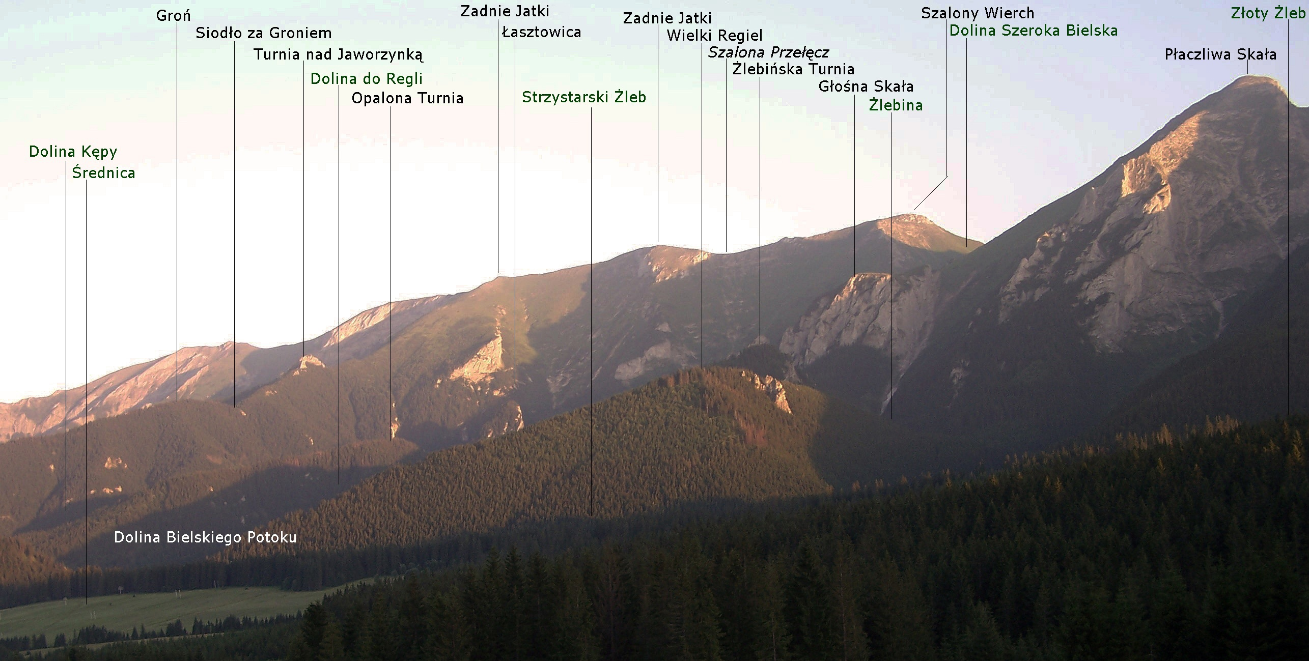 Tatry Bielskie od południowej strony